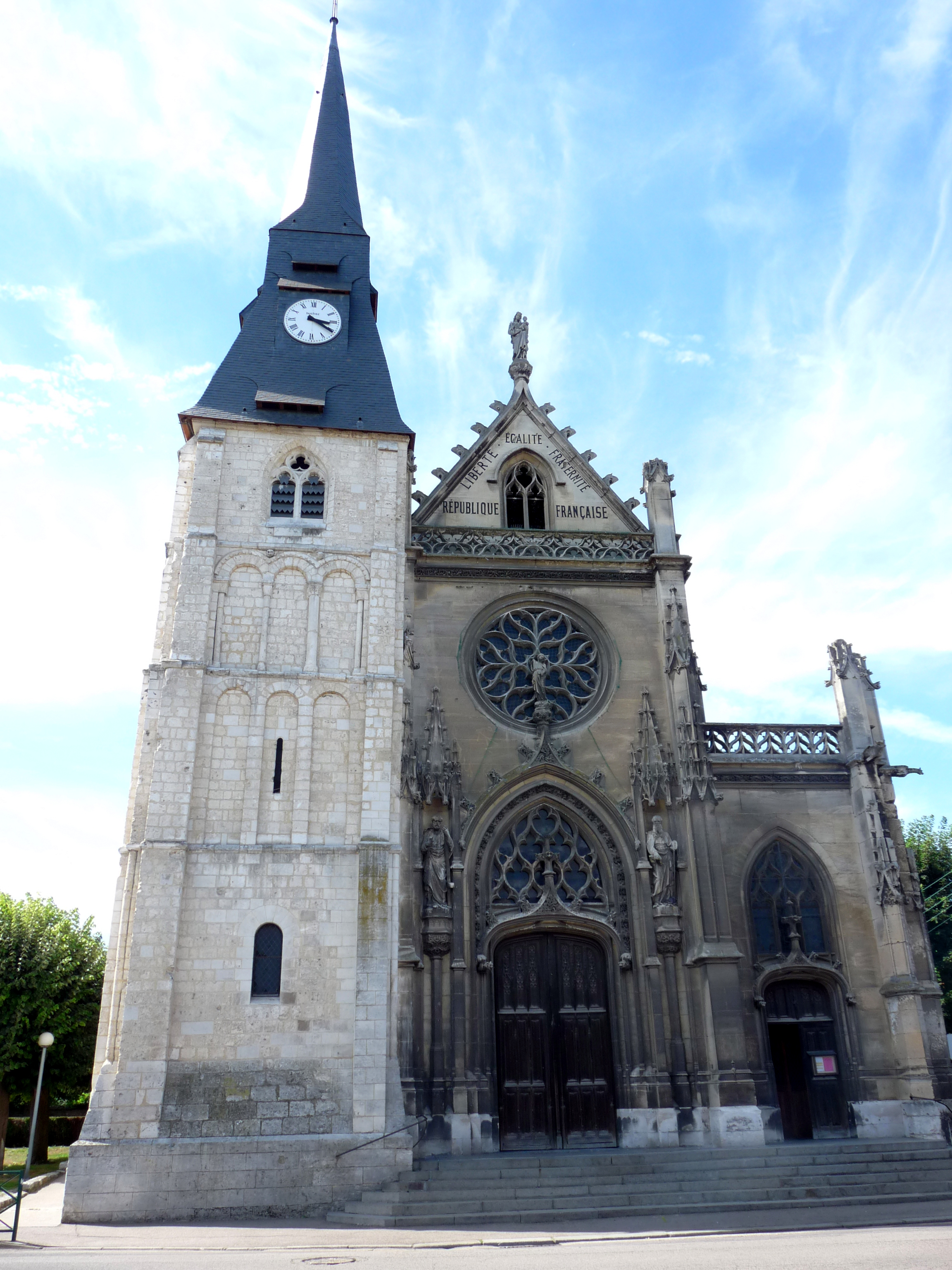 Église Notre-Dame de Caudebec-lès-Elbeuf (Inscrit) .